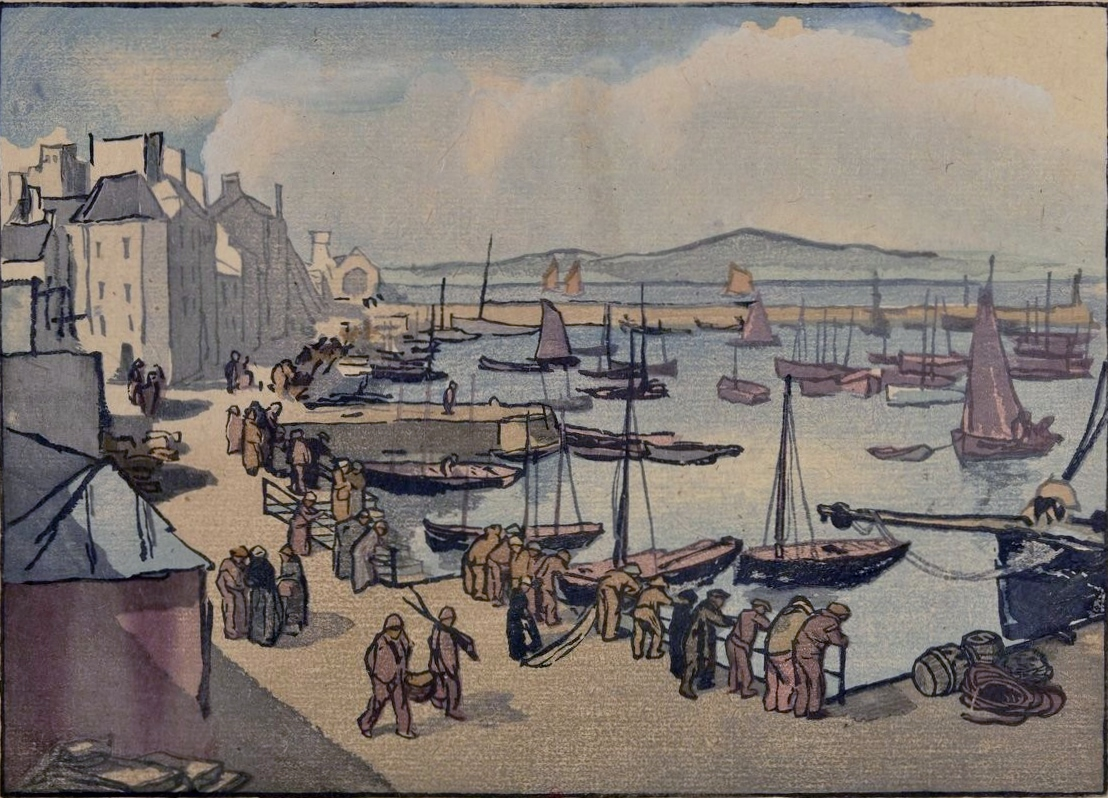 Jules Chadel : Le port de Douarnenez (estampe, 1924)